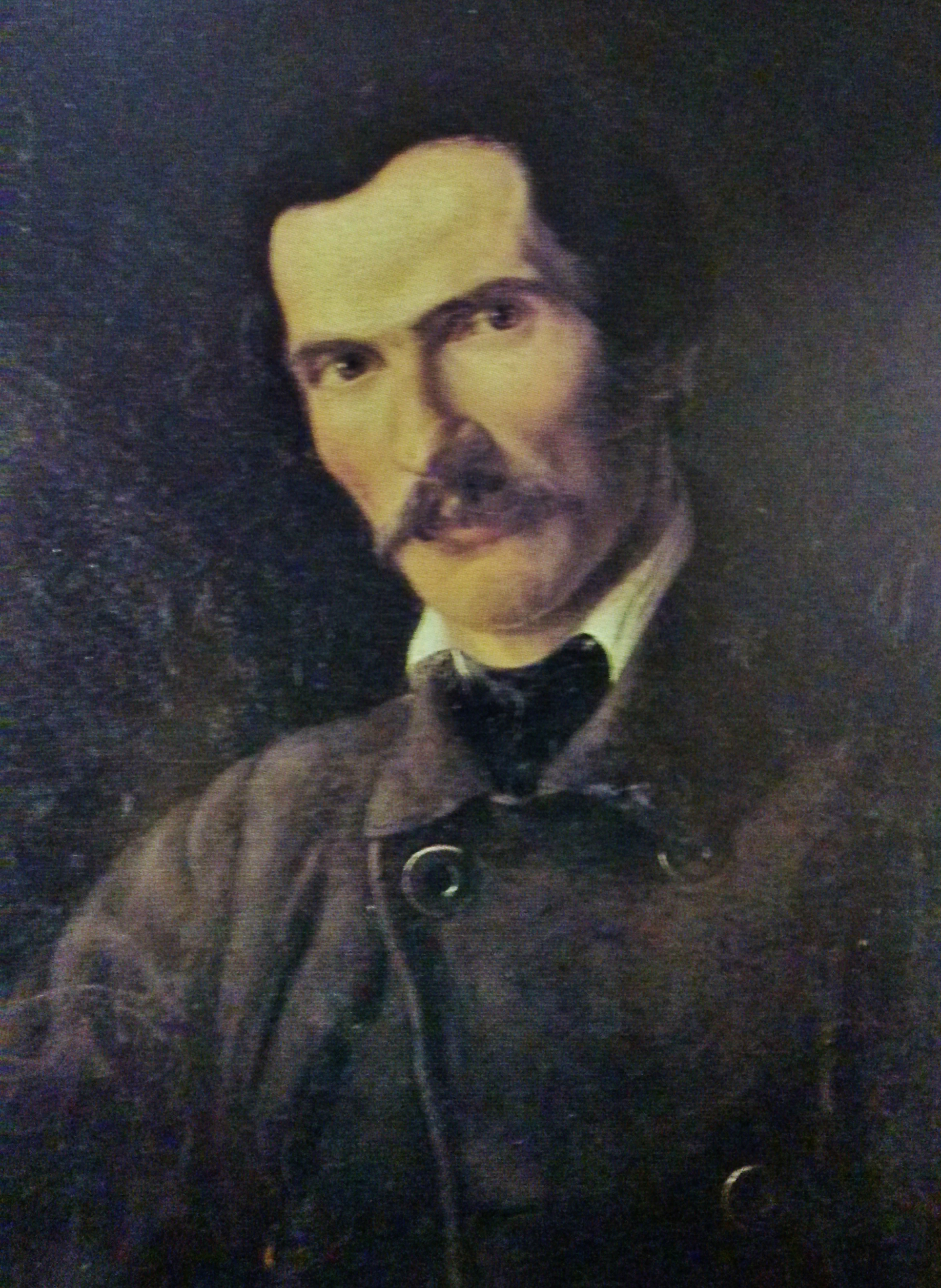 Louis de Leuw, *21.01.1819, gemalt vom Friedrich-August de Leuw, 1857/58, abgedruckt in und abfotografiert aus "Die Heimat", 5/1989